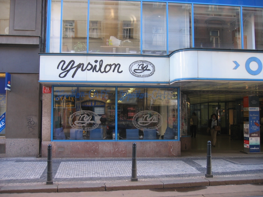 Fotografie Studia Ypsilon